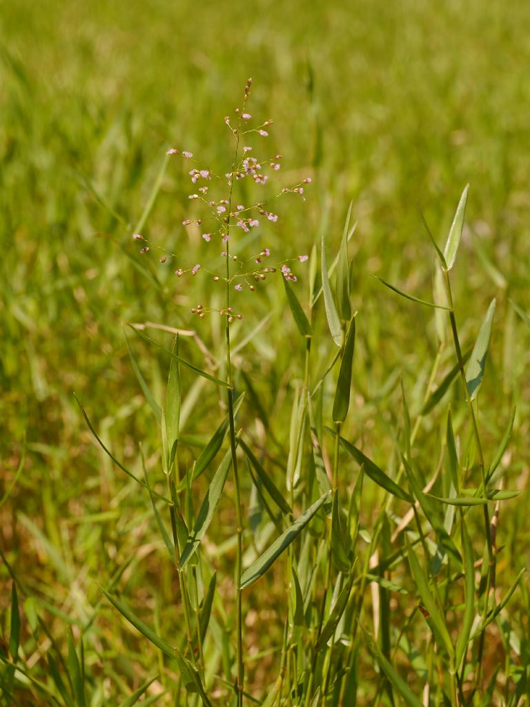 Isachne_globosa：チゴザサ 2015/09/13 和歌山県田辺市：Tanabe City. Wakayama Pref. Japan